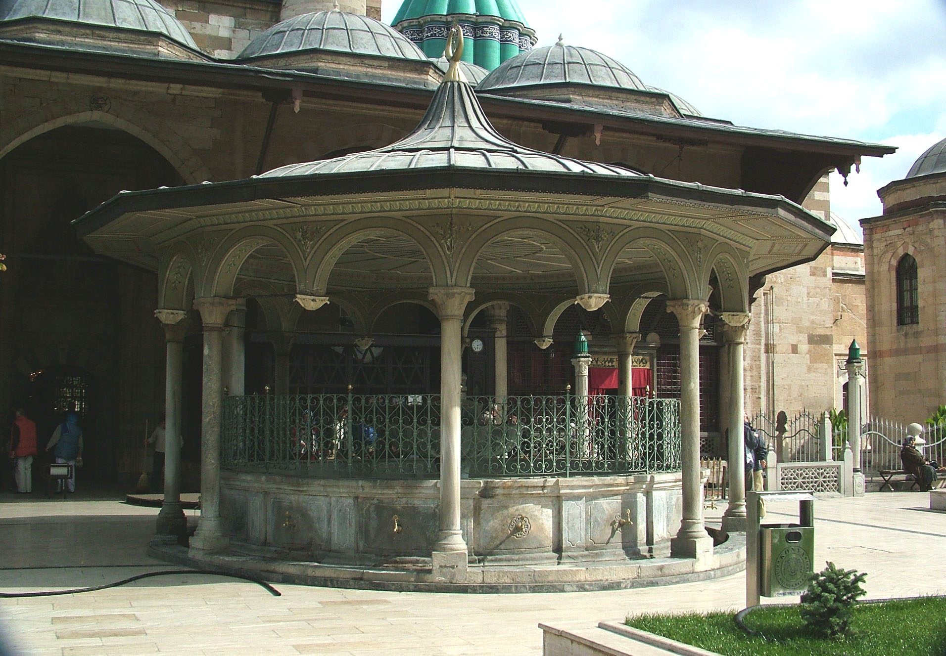 Rituális kút a Mevlana-múzeum udvarán (Konya, Törökország)